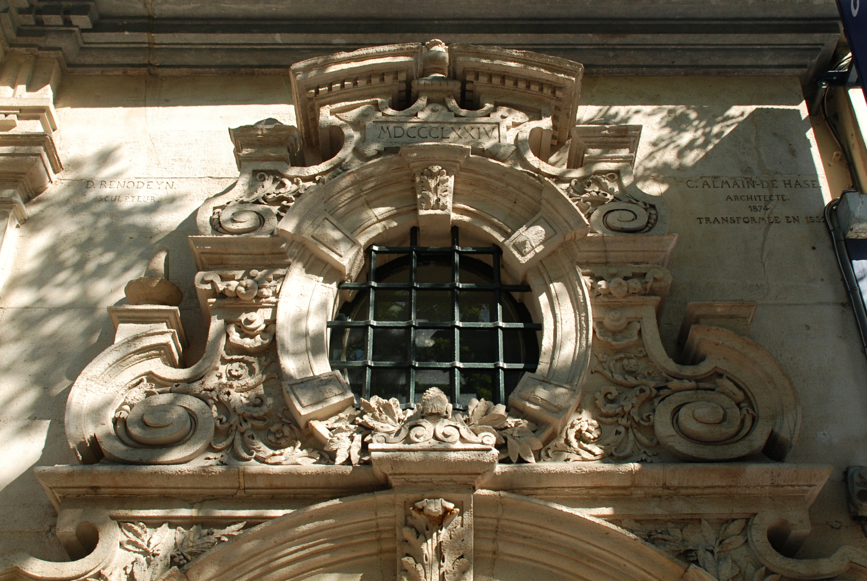 Belgique - Bruxelles - Maison presbytérale de l'église Notre-Dame du Finistère